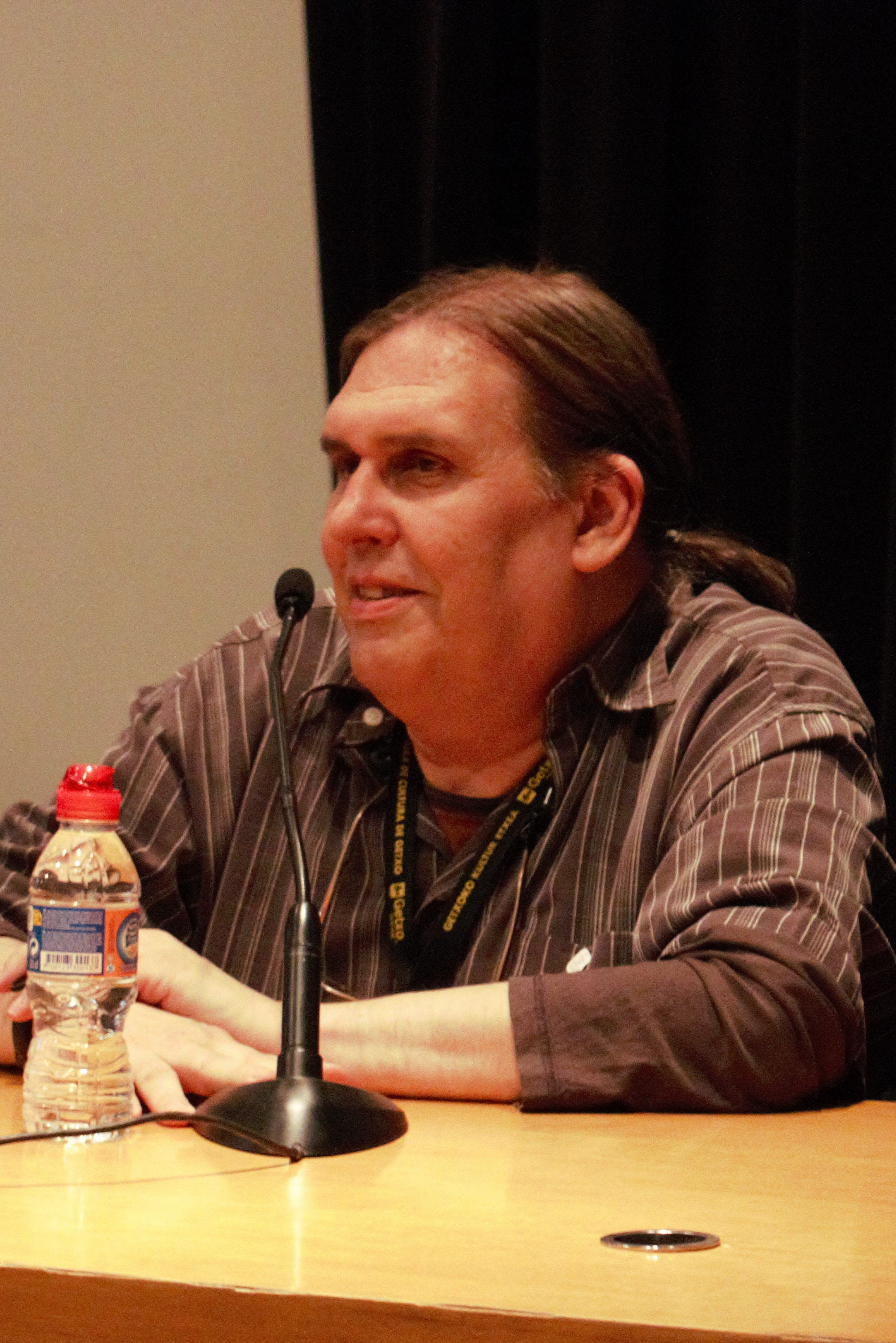 Emilio Bernárdez, director editorial de La Cúpula, a la taula rodona "Les revistes del boom". Saló Internacional del Còmic de Barcelona de 2018. Horari: 19.00-20.00 h. Data: Dijous 12 d'abril de 2018.